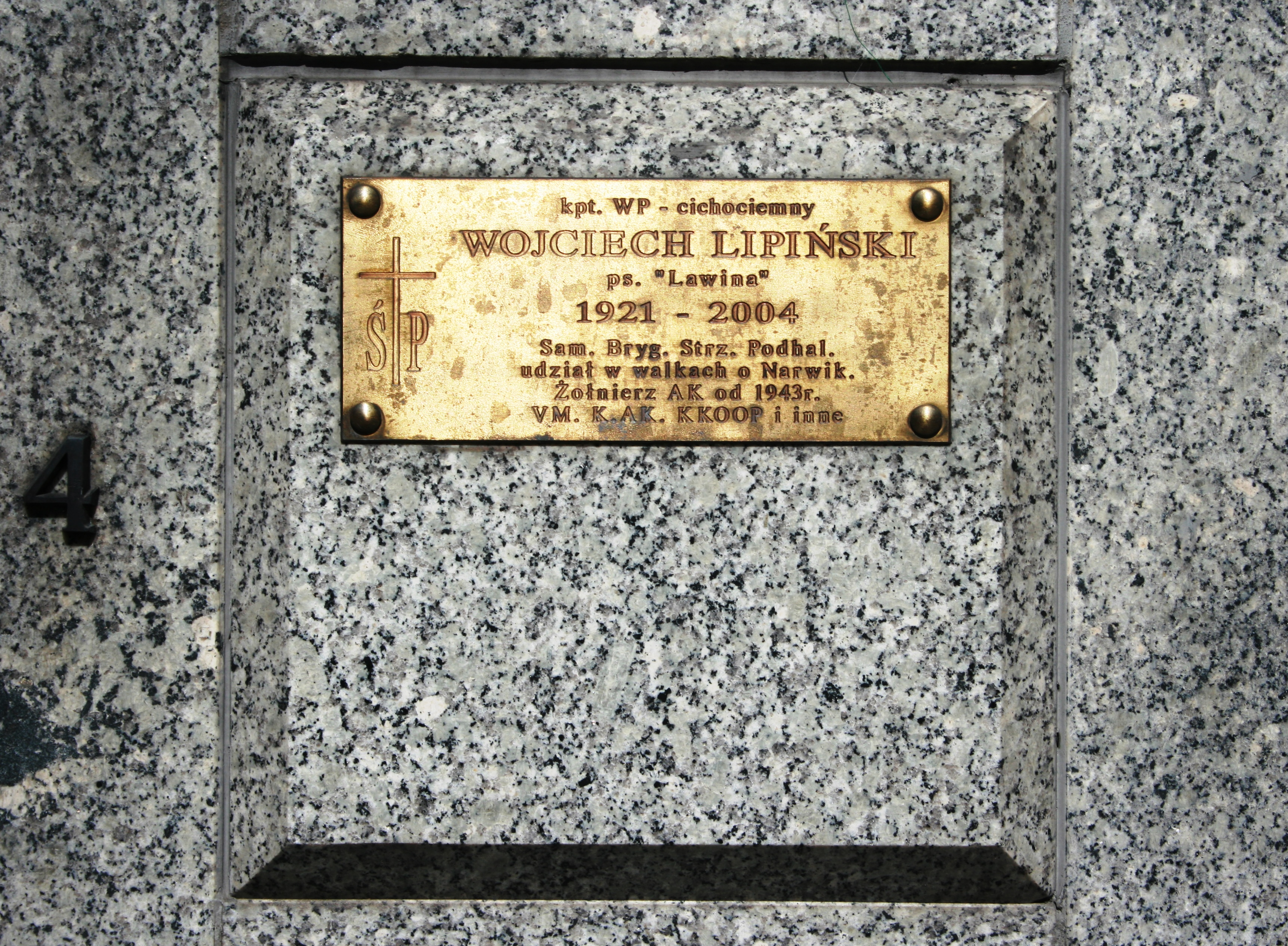 Grób w Panteonie Żołnierzy Polski Walczącej (kwatera D18) na Cmentarzu Wojskowym w Warszawie